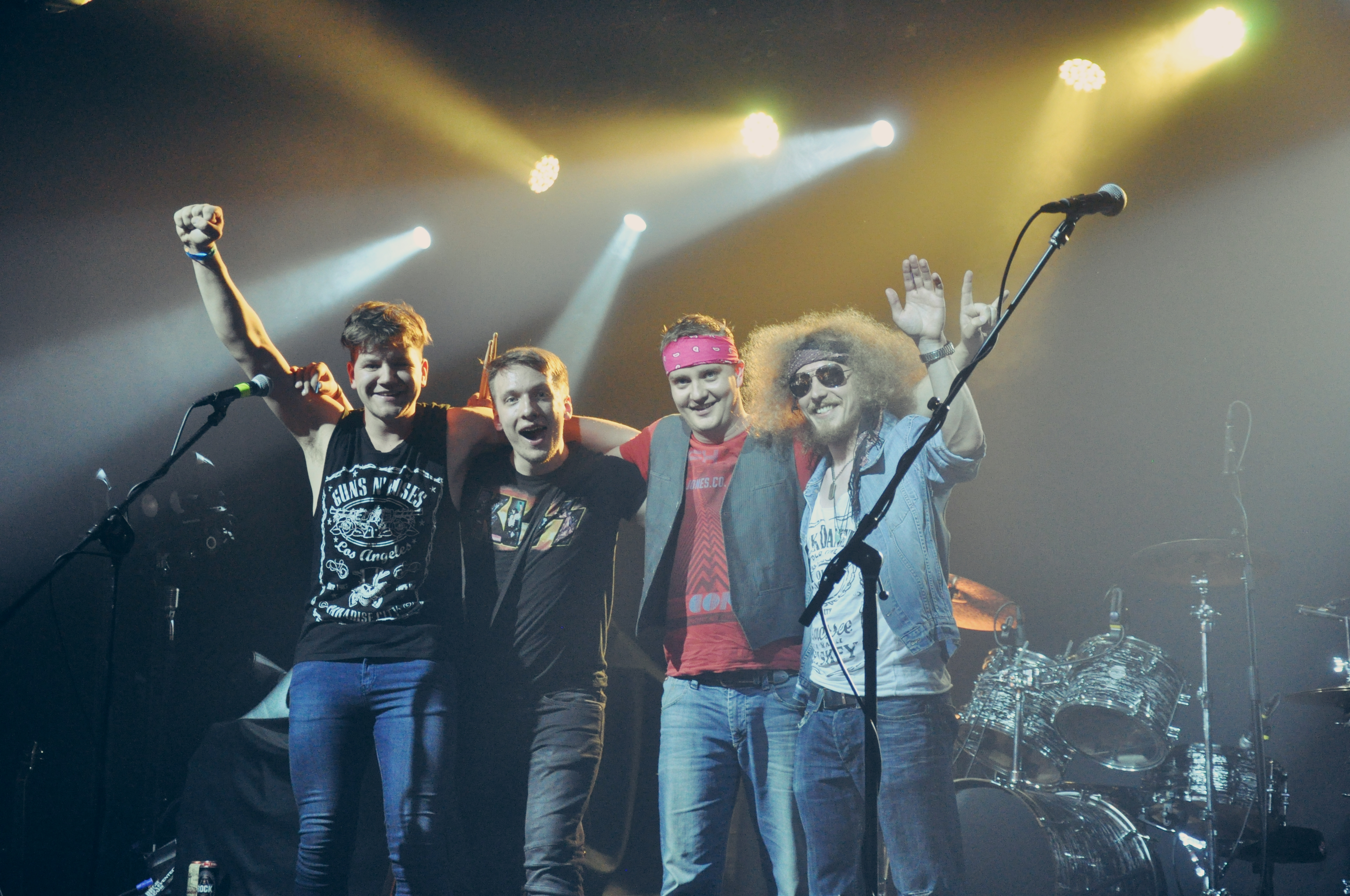 RockCafes